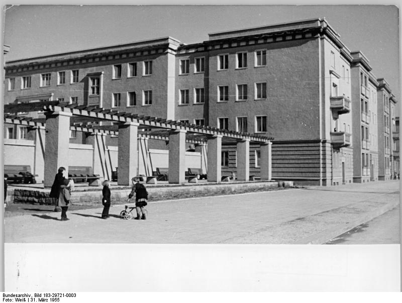 Zentralbild Weiß 1.4.1955 Aufbau im demokratischen Sektor Groß-Berlins UBz: Neue Wohnbauten an der Kniprodestrasse (Aufgenommen 31.3.1955) .